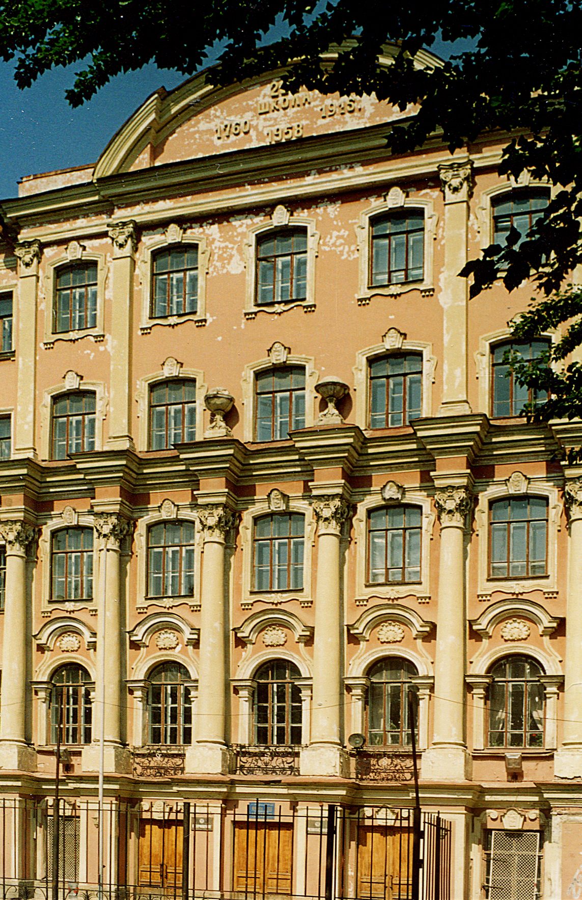 Школа при церкви Св.Петра.Невский пр.22-24. _Гофман